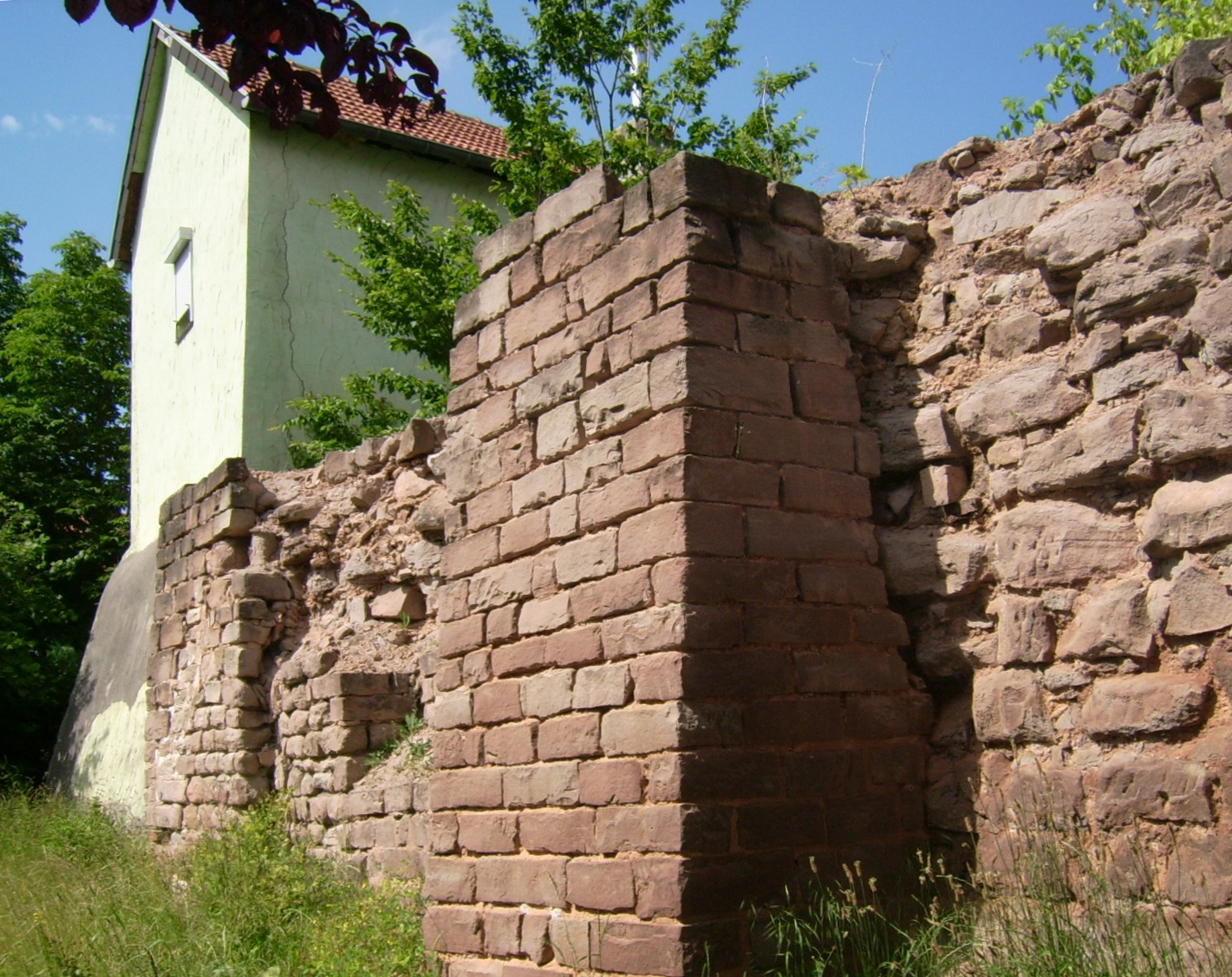 St. Wendel Stadtmauer